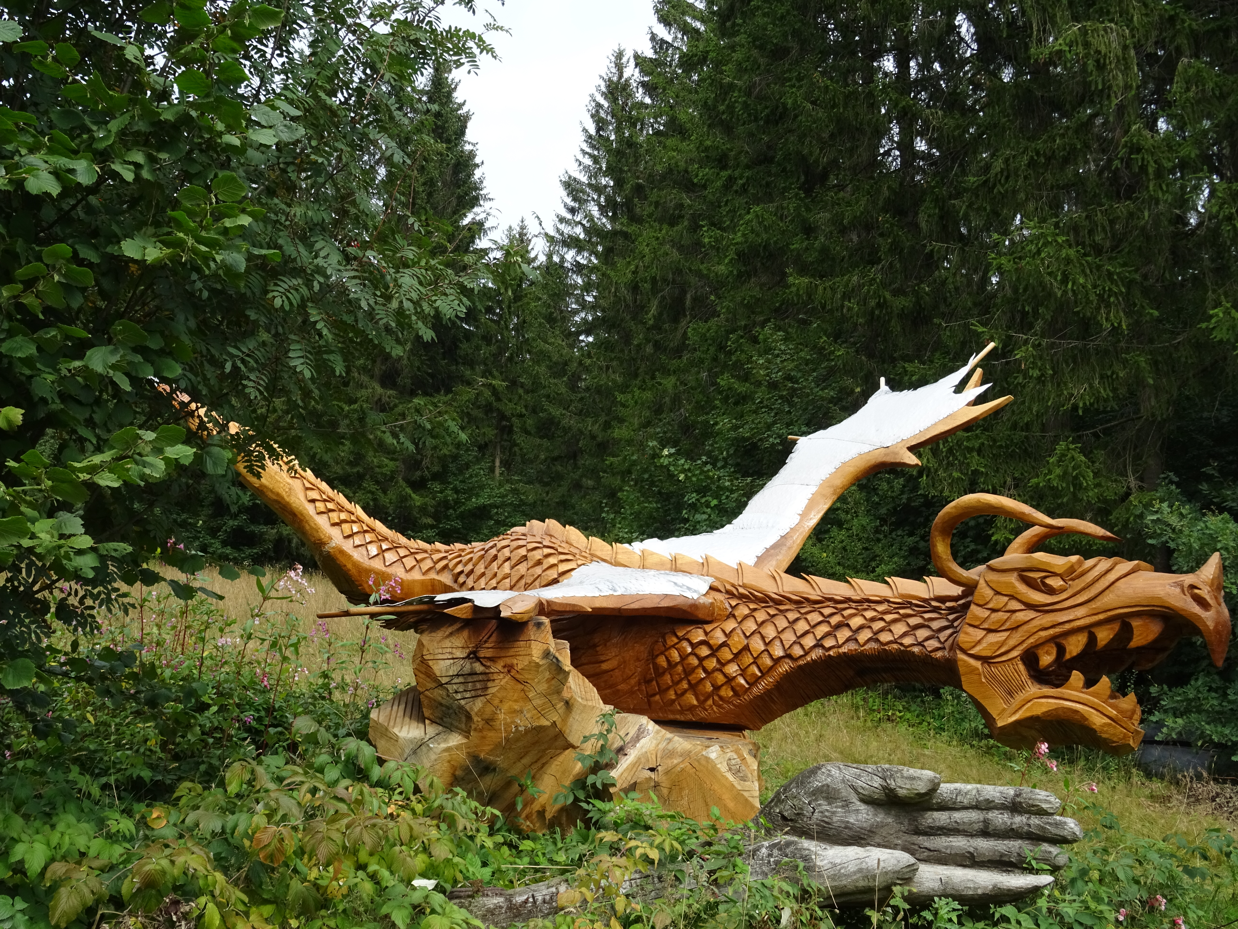 Blockhausen: Kettensägen-Schnitzen